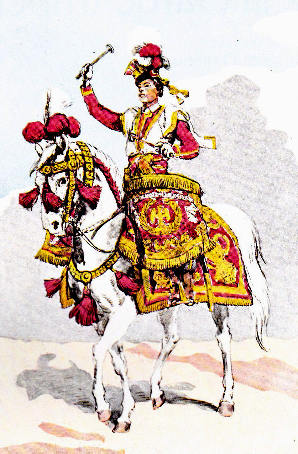 Timbalier du 1er régiment de chevau-légers lanciers polonais de la Garde impériale. Le Français Louis Robiquet, qui remplit ce rôle à partir de 1810, meurt en Russie pendant la campagne de 1812, et n'est pas remplacé par la suite.